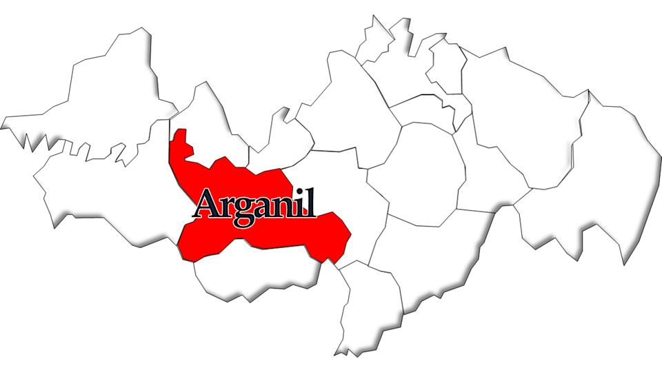 População